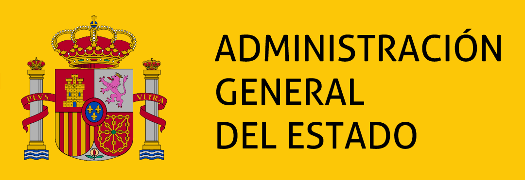 Logotipo NO OFICIAL de la Administración General del Estado